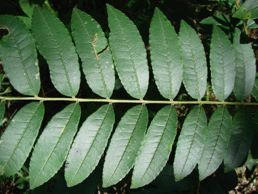 Zanthoxylum rhoifolium - RUTACEAE Jardim Botânico de Brasília - Distrito Federal - Brasil.